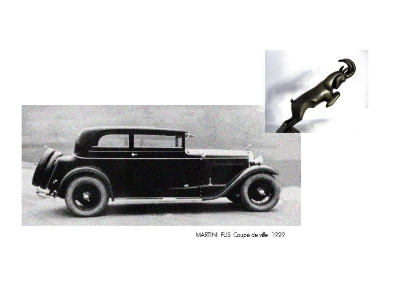 Martini FUS Coupé de ville 1929 / Kühlerfigur